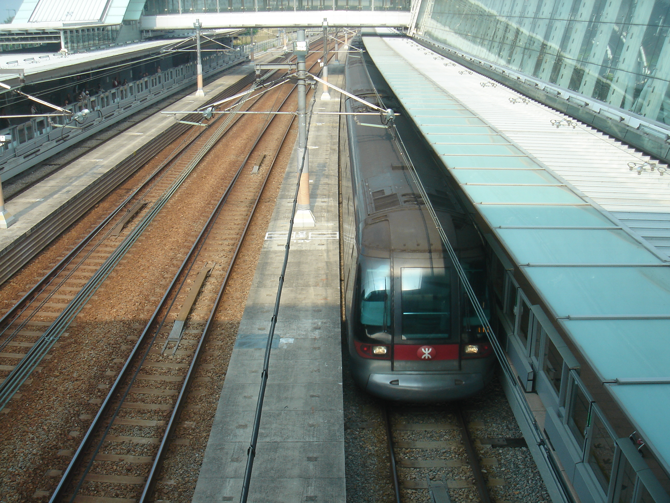 Tung Chung rolling stock at Sunny Bay station, MTR Hong Kong.